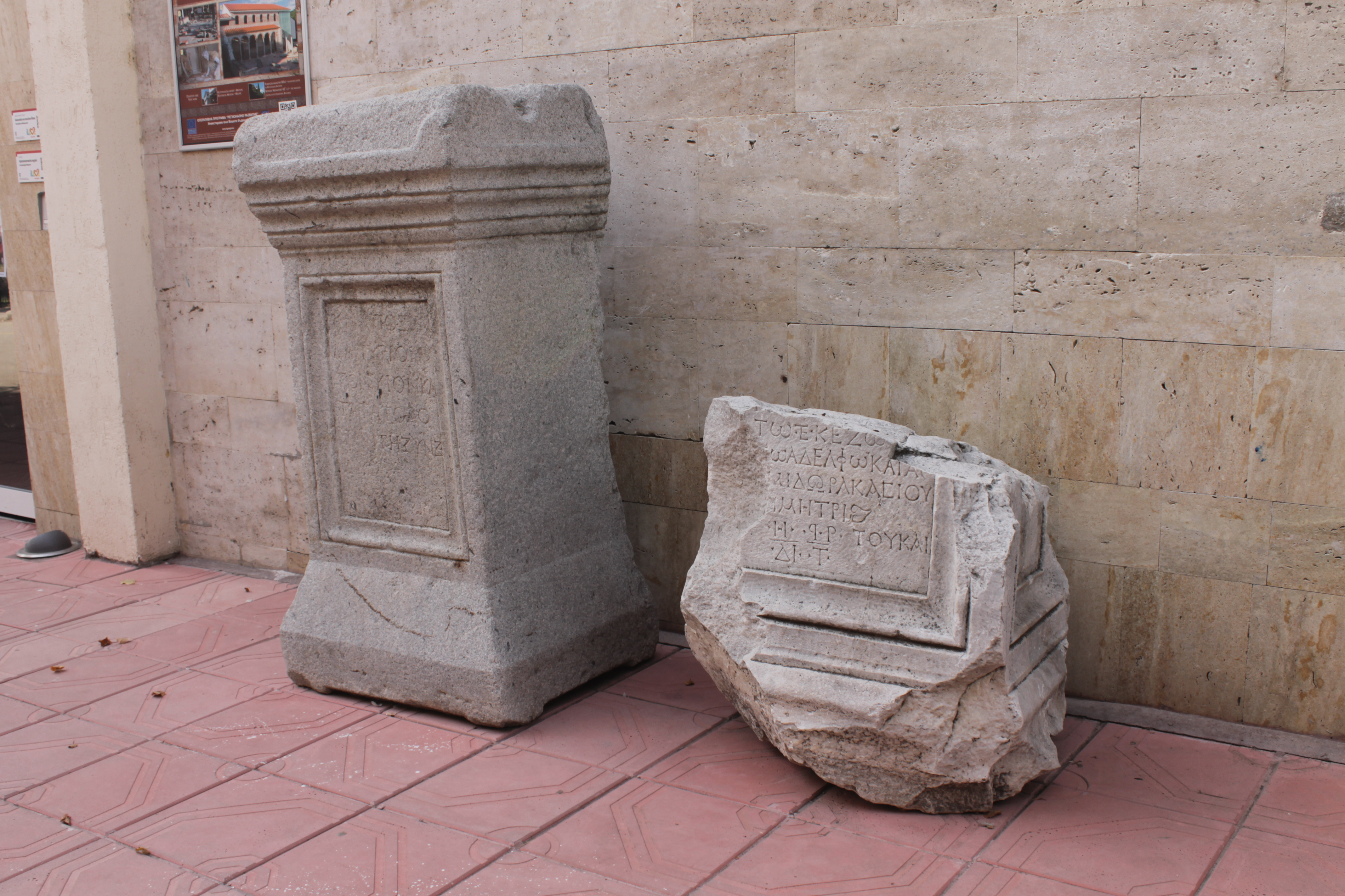 Пред Археологически музей в Сандански